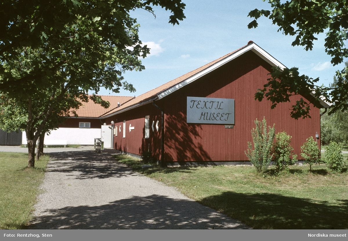 Textilmuseet i Högbo. Exteriör. Textilmuseet i Högbo utanför Sandviken. Museet rymde Hedvig Ulfsparres dokumentation av de svenska hemslöjdsföreningarnas textila produktion under 1900-talets första hälft. Textilmuseet var en filial till Nordiska museet. Textilmuseet i Högbo lades ner år 2004 och samlingarna är flyttade till Länsmuseet i Gävle.